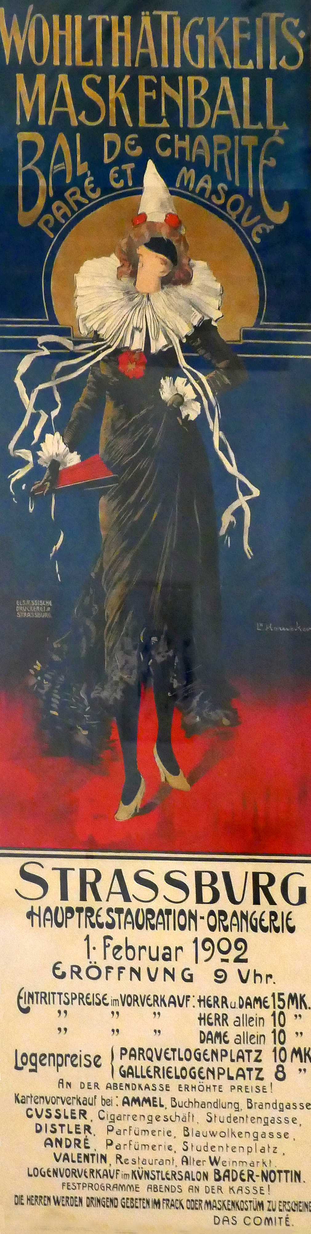 Léon Hornecker. Affiche pour le Bal de charité paré et masqué, 1er février 1902, à l'Orangerie (Strasbourg). Lithographie. Exposition Laboratoire d'Europe Strasbourg, 1880-1930 au Musée d'art moderne et contemporain de Strasbourg.